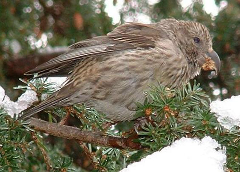 Grankrossnebb i snøen.